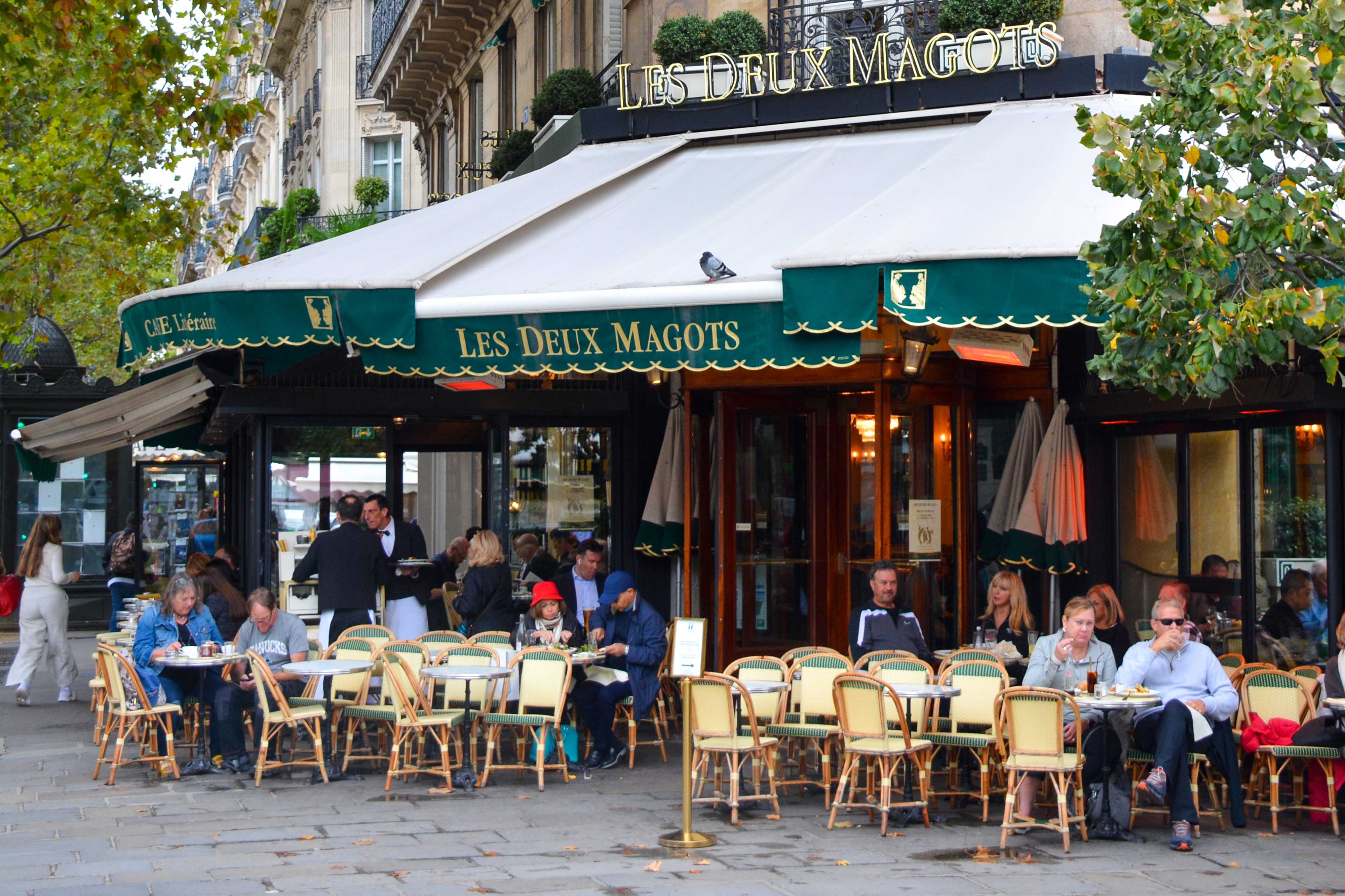 Les Deux Magots, Paris, France.